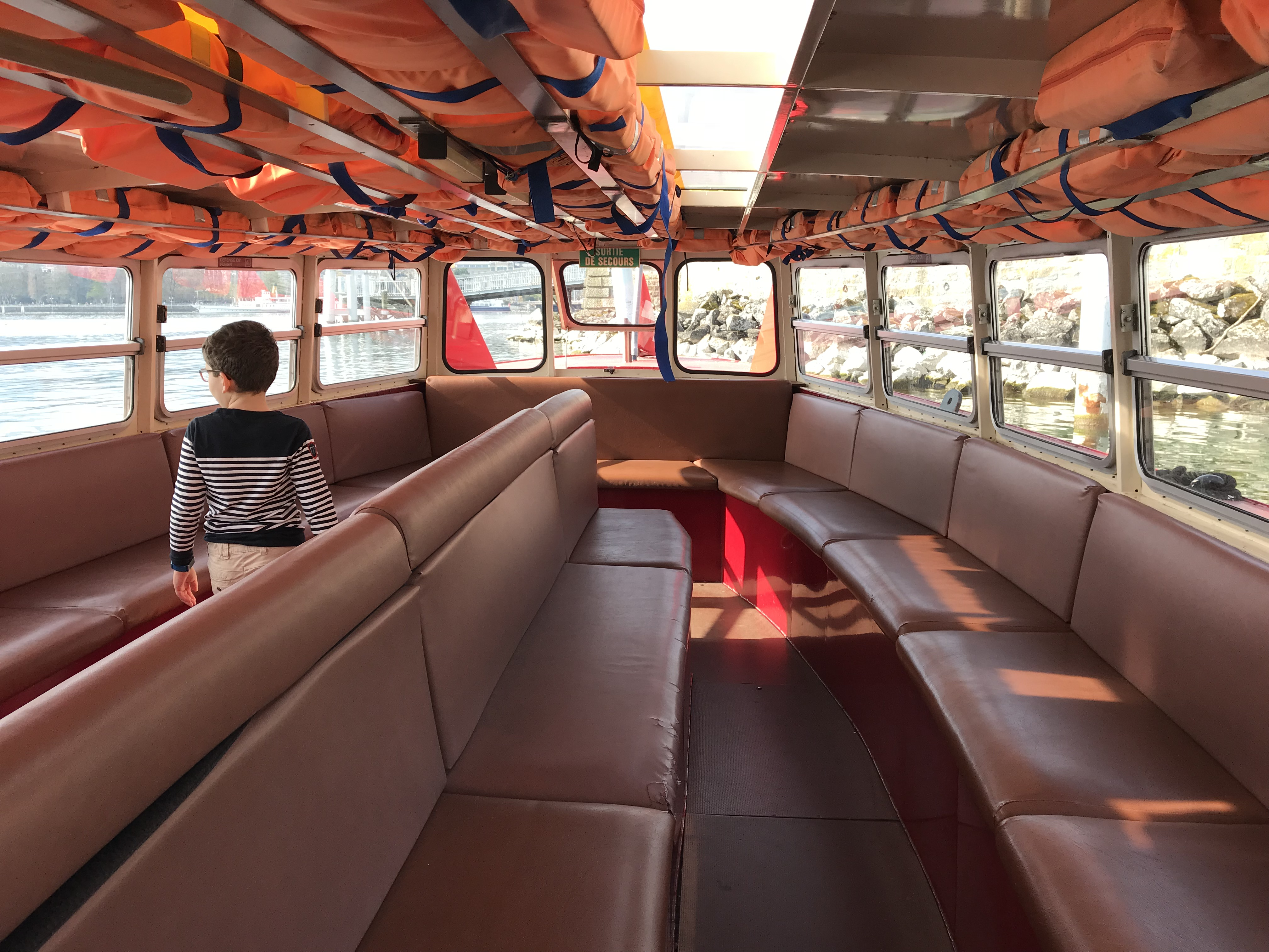 Mouettes genevoises (2018).